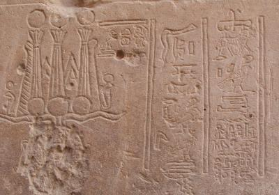 Description : Dernière inscription hiéroglyphique connue, porte d'Hadrien à Philæ (invocation au dieu Mandoulis) Source : S. Rosmorduc, 2004 (photographie personnelle) Statut : GFDL Référence bibliographique: DEVAUCHELLE, Didier, 24 août 394 - 24 août 1994. 1600 ans, Bulletin de la société française d'égyptologie 131 (1994), 16-18